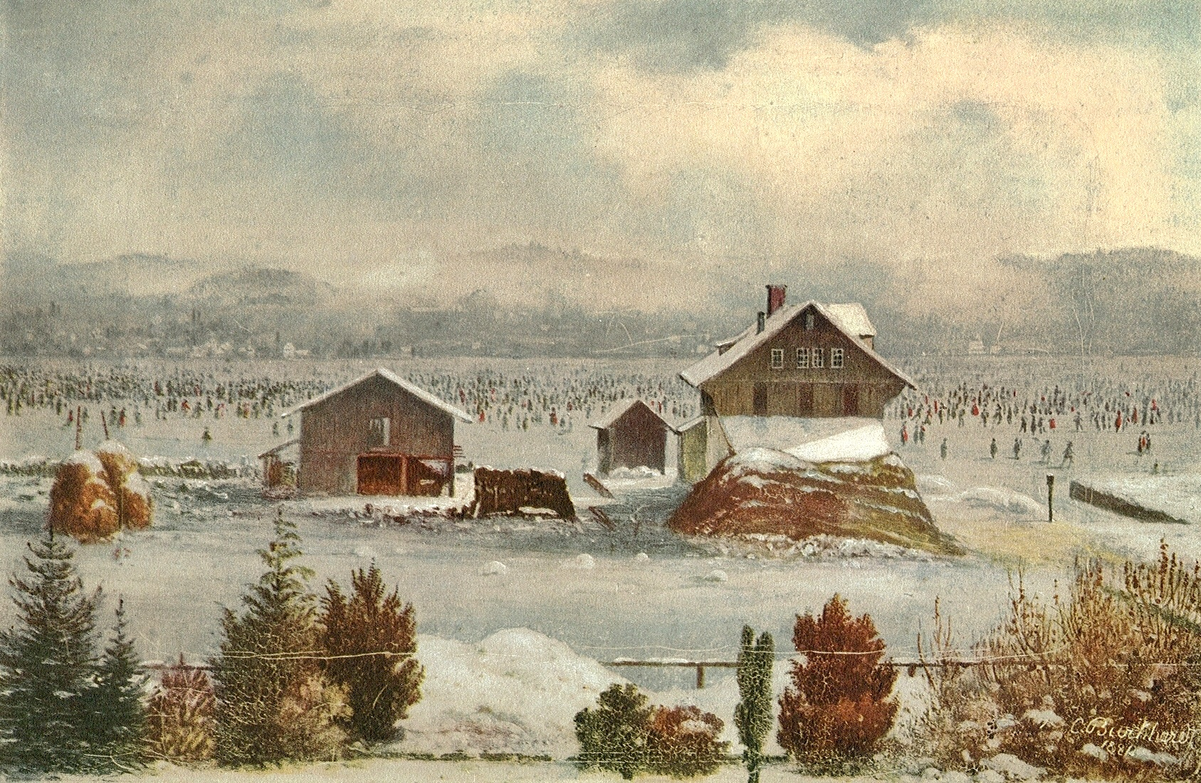 Seegfrörni vor Wollishofen 1880, Gemälde von Caspar Burkhard